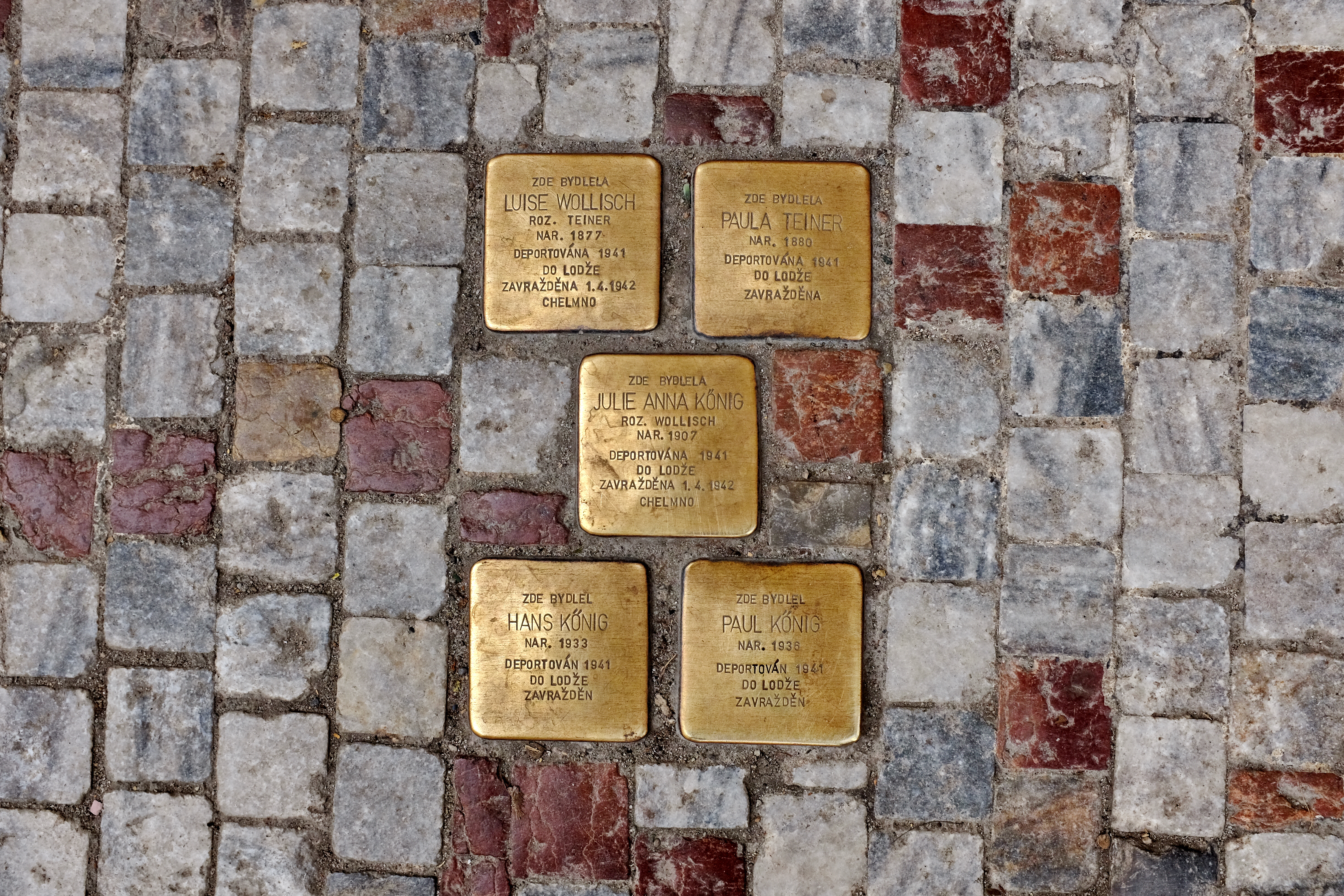 Kameny zmizelých v Karlových Varech u Mlýnské kolonády